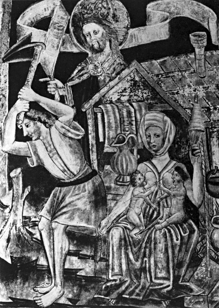 Иван из Каствы. Деталь росписи церкви в Храстовле. 1490